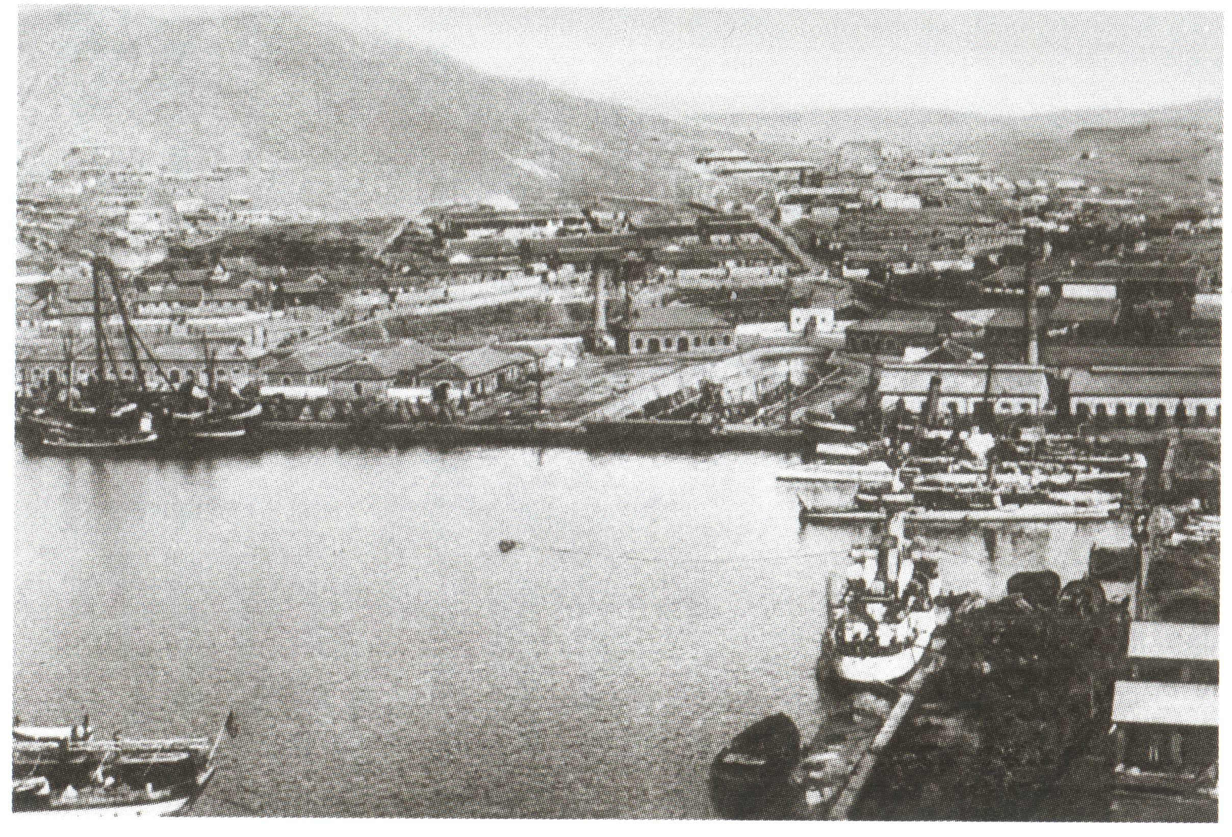 Гавань Порт-Артура. Открытка начала XX века.